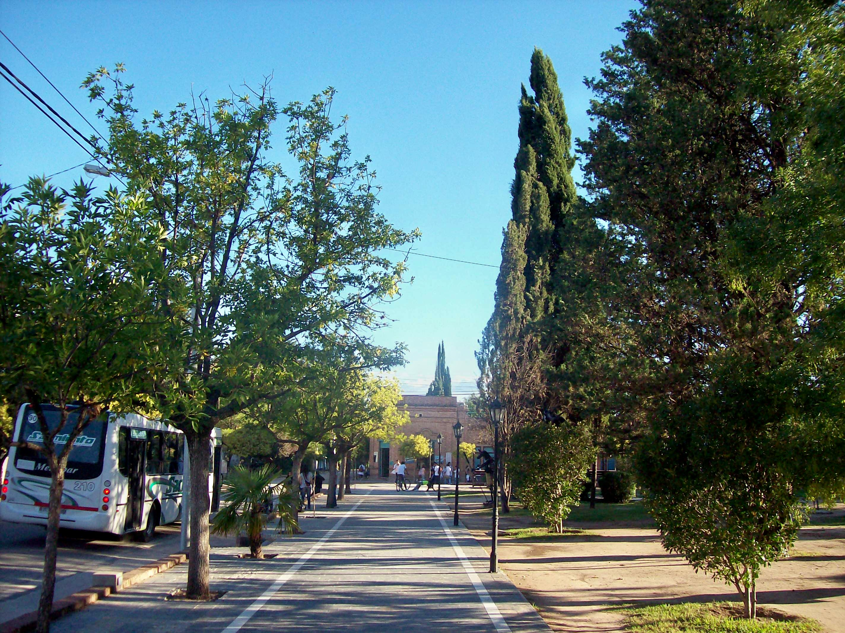 Calle Vicente Castro, y Plaza principal de Nono, provincia de Córdoba, Argentina.